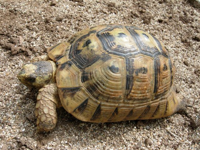 Testudo graeca nabeulensis varietà 'Sarda', Sardegna, Italia